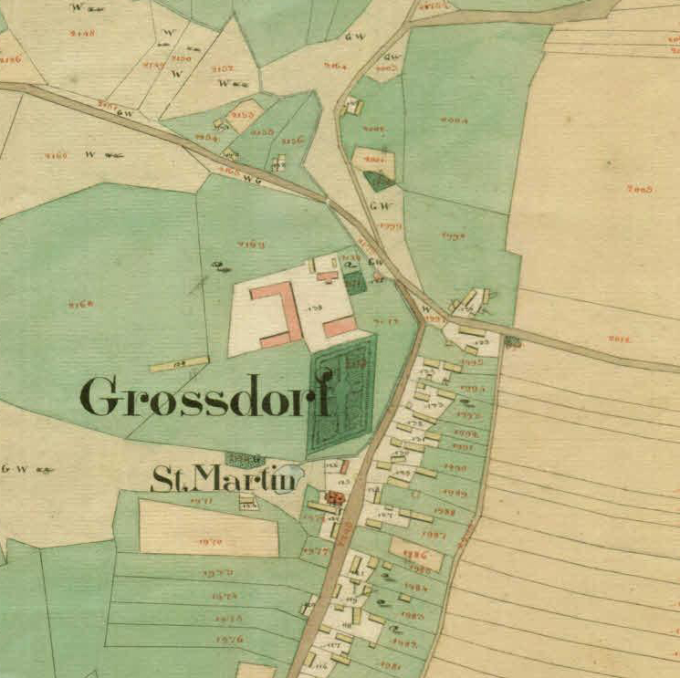 Franciscejski kataster za Kranjsko, 1823-1869